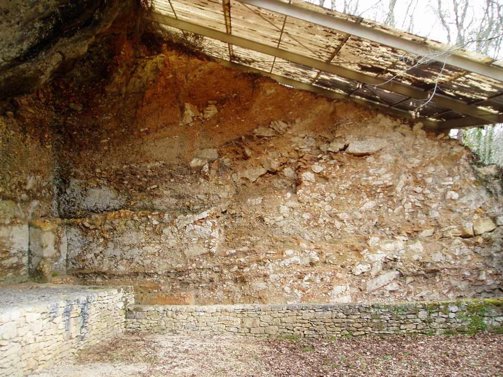 photo personnelle de la coupe sagittale de référence du site préhistorique de La Ferrassie (Savignac-de-Miremont, Dordogne, France) en 2005 auteur : Vincent Mourre